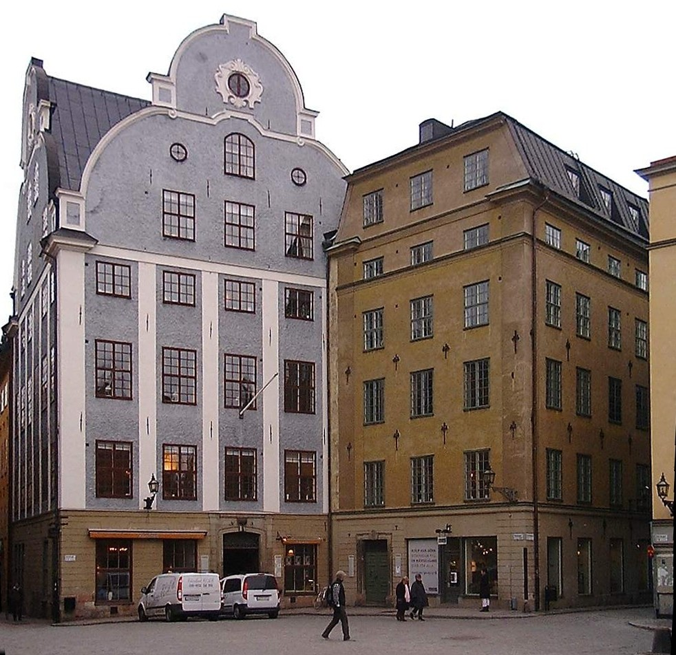 Façades of 3-5, Stortorget in Gamla stan, Stockholm.